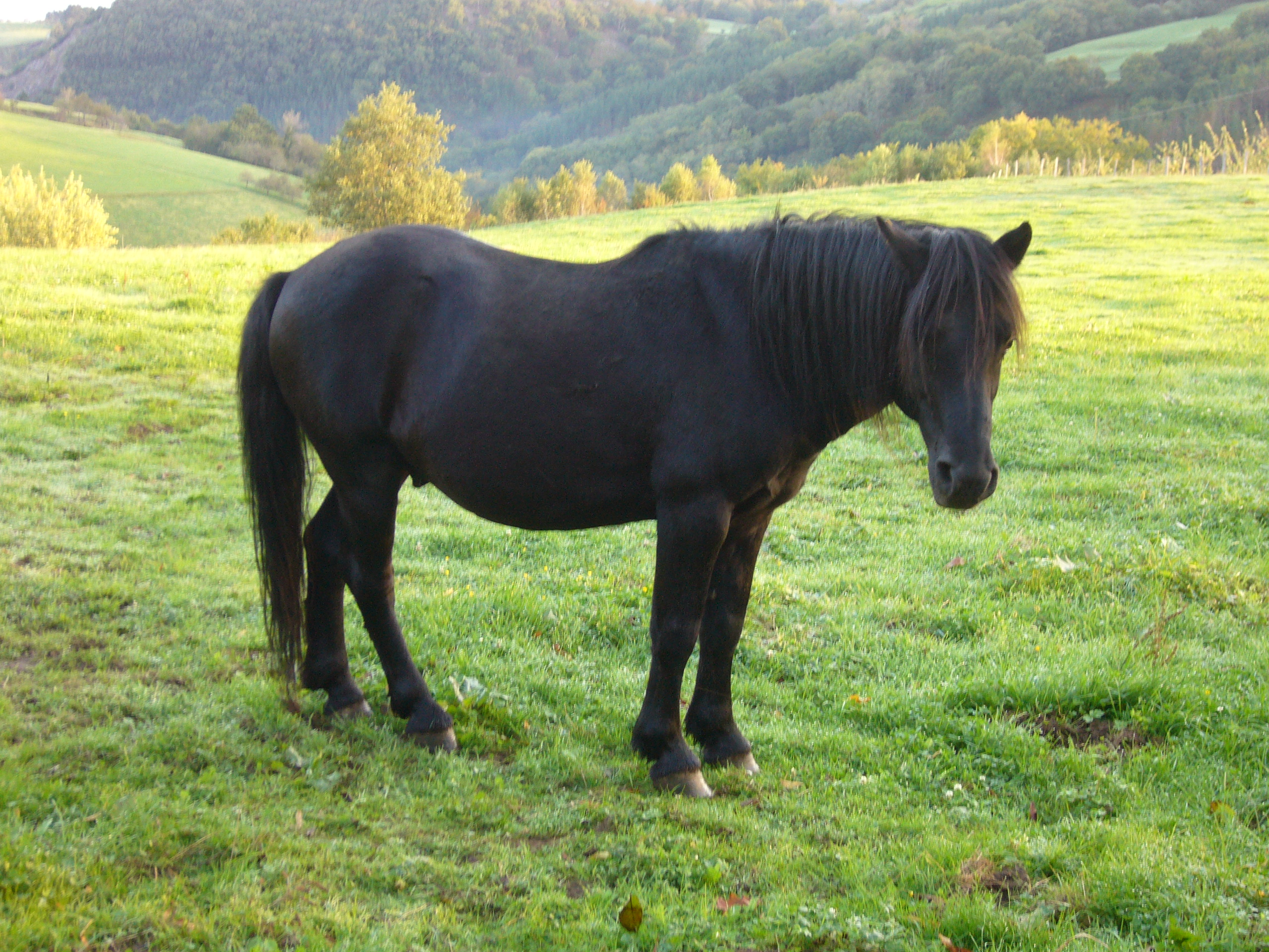 Pottok arra Orbelaunen, Pagoeta.·